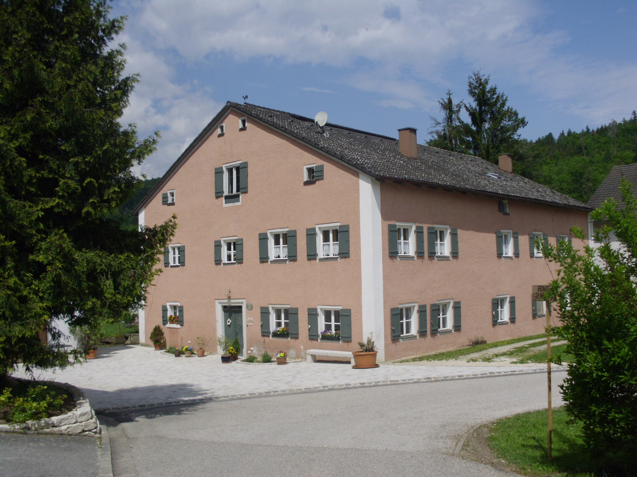 Mattenmühle am Möhrenbach, Ortsteil von Treuchtlingen im Landkreis Weißenburg-Gunzenhausen, Mühlengebäude